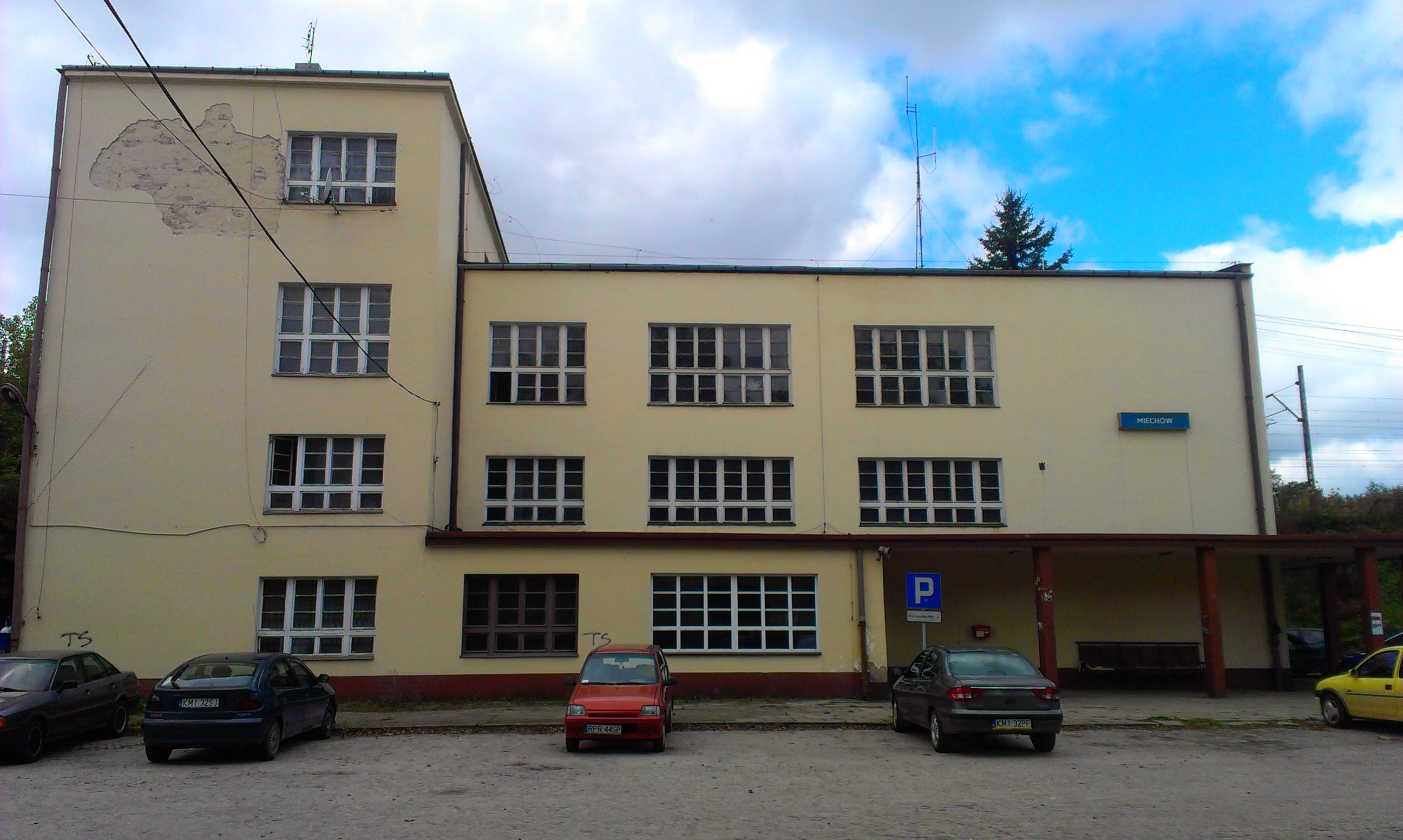 Budynek dworca w Miechowie.